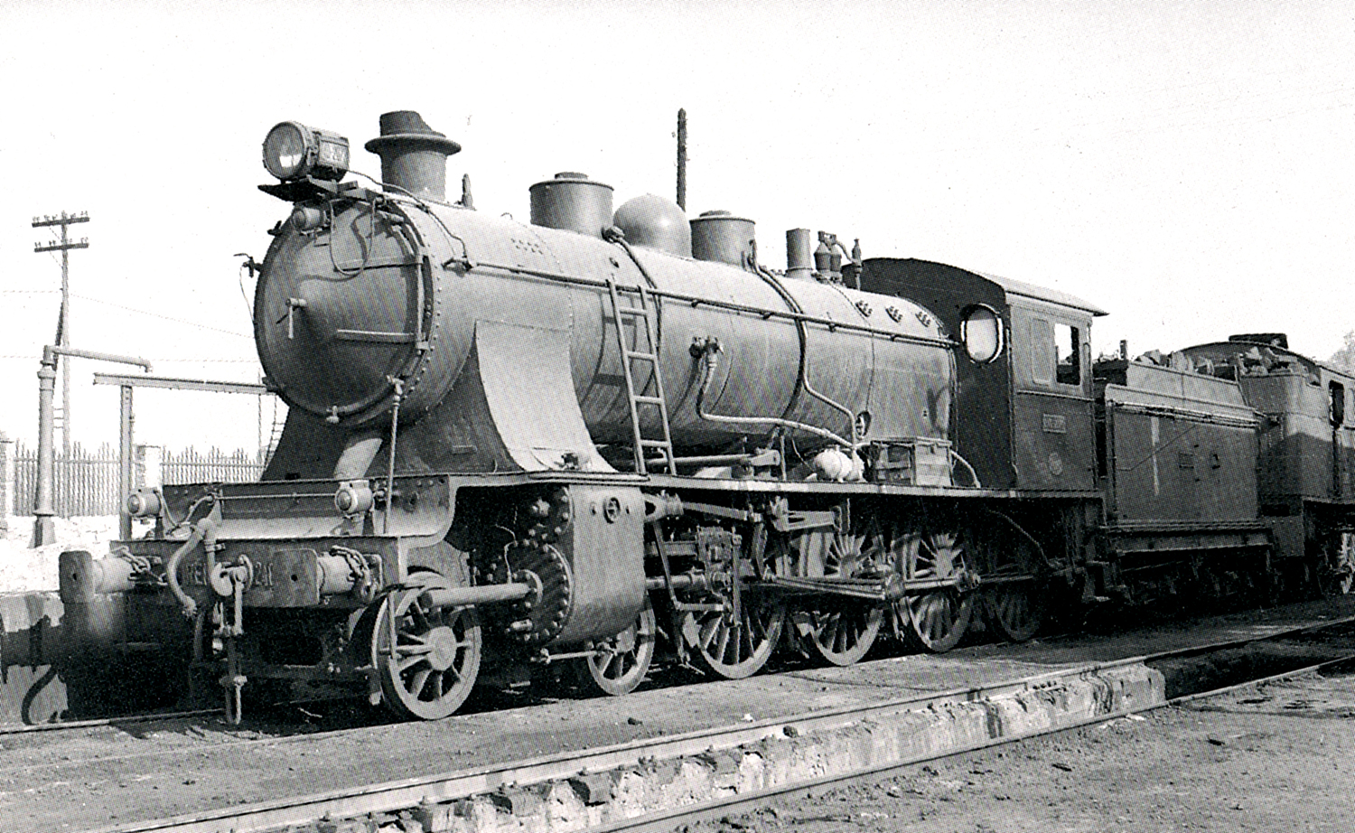 Locomotora de vapor 240-2074